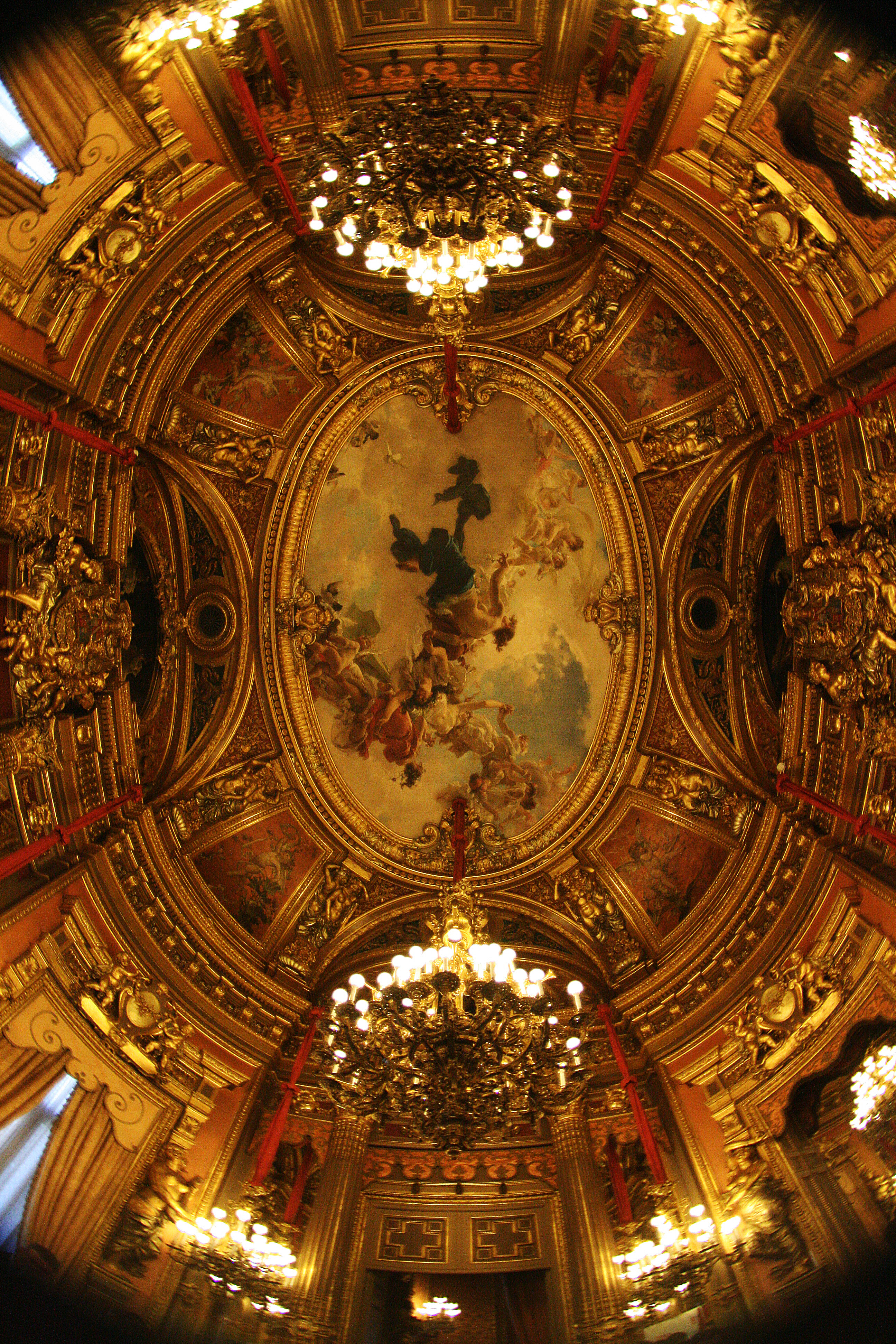 Techo@Casa de América